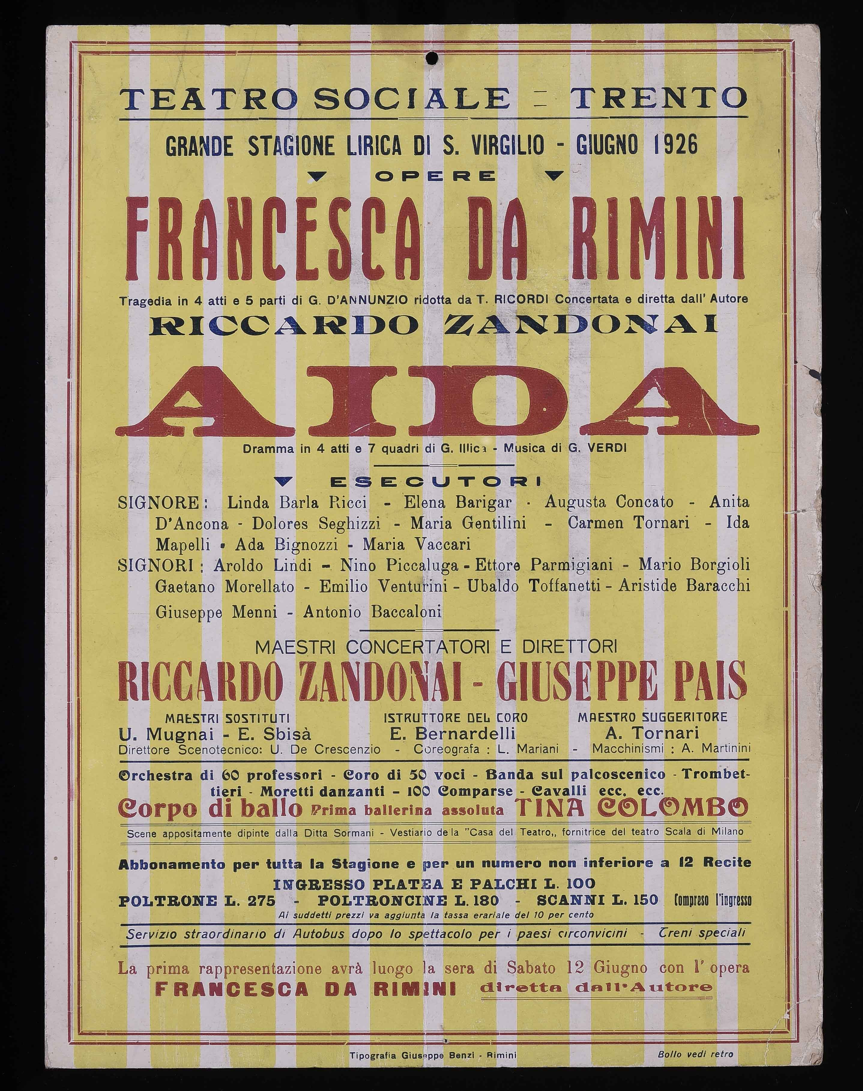 Manifesto teatrale.